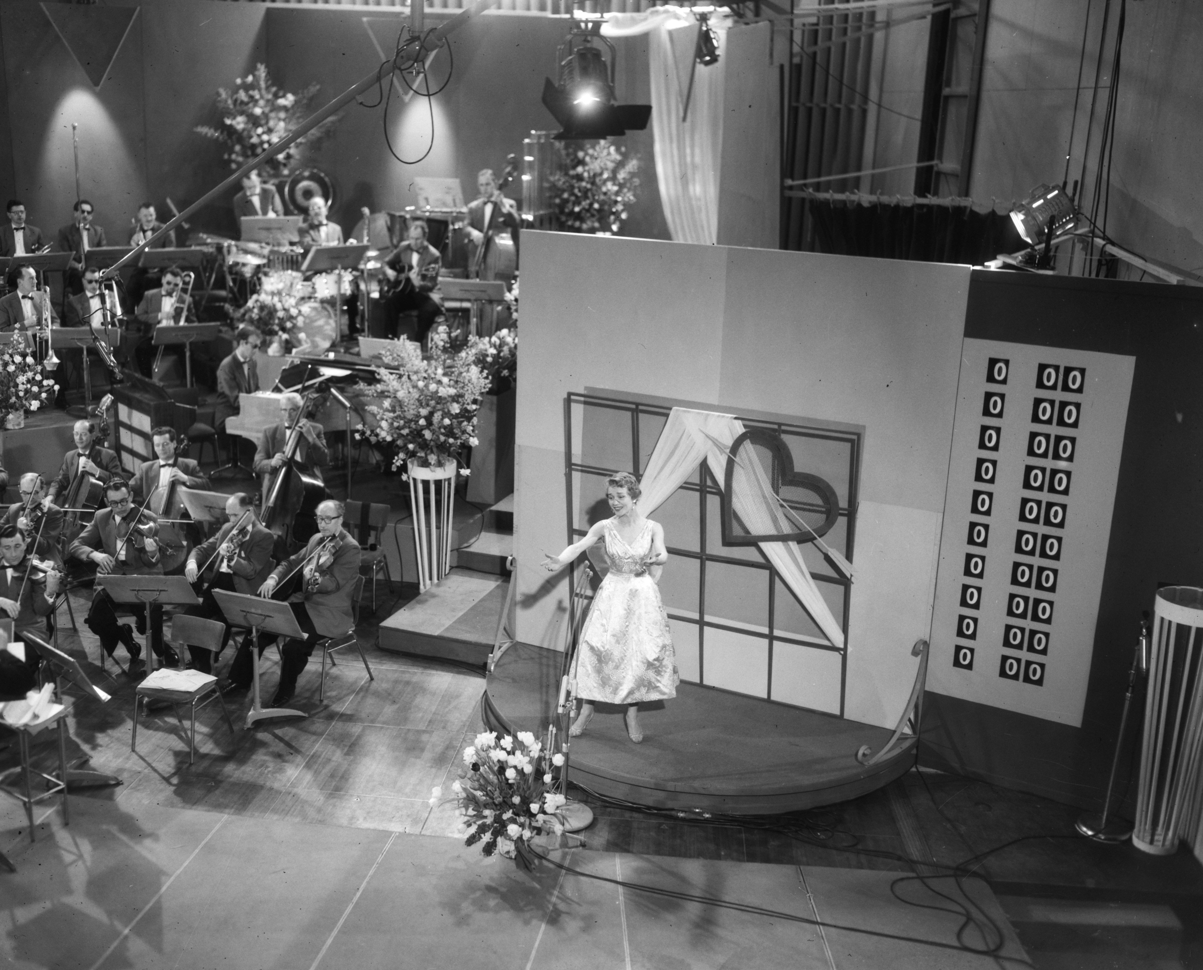 Collectie / Archief : Fotocollectie Anefo Reportage / Serie : Songfestival 1958 Beschrijving : Deelneemster Solange Berry (Luxemburg) Datum : 11 maart 1958 Locatie : Hilversum, Noord-Holland Trefwoorden : songfestivals, zangeressen Persoonsnaam : Berry, Solange Fotograaf : Pot, Harry / Anefo Auteursrechthebbende : Nationaal Archief Materiaalsoort : Negatief (zwart/wit) Nummer archiefinventaris : bekijk toegang 2.24.01.04 Bestanddeelnummer : 909-4009